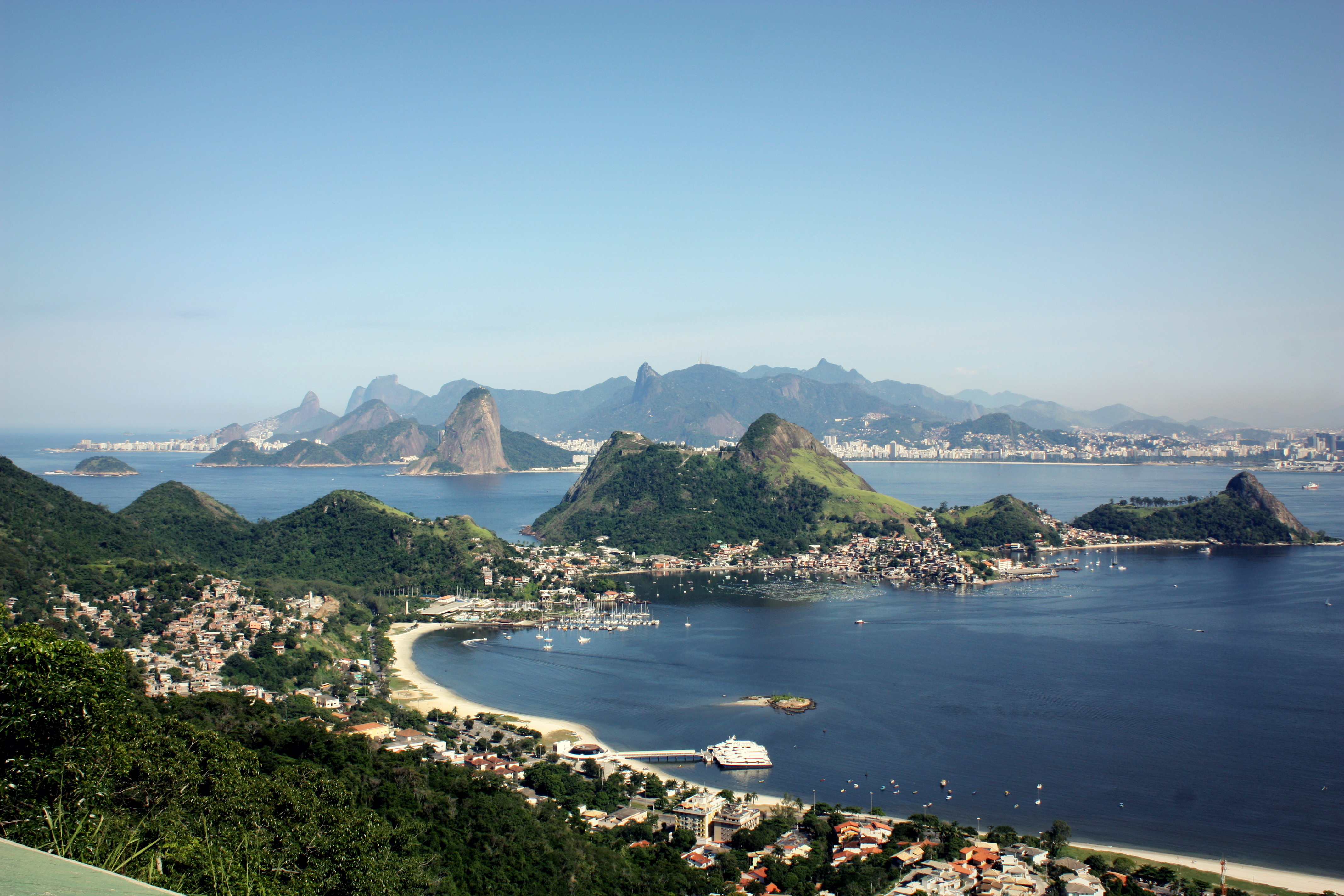 Vista de parte de Niterói e Rio de Janeiro, a partir do alto do Parque da Cidade